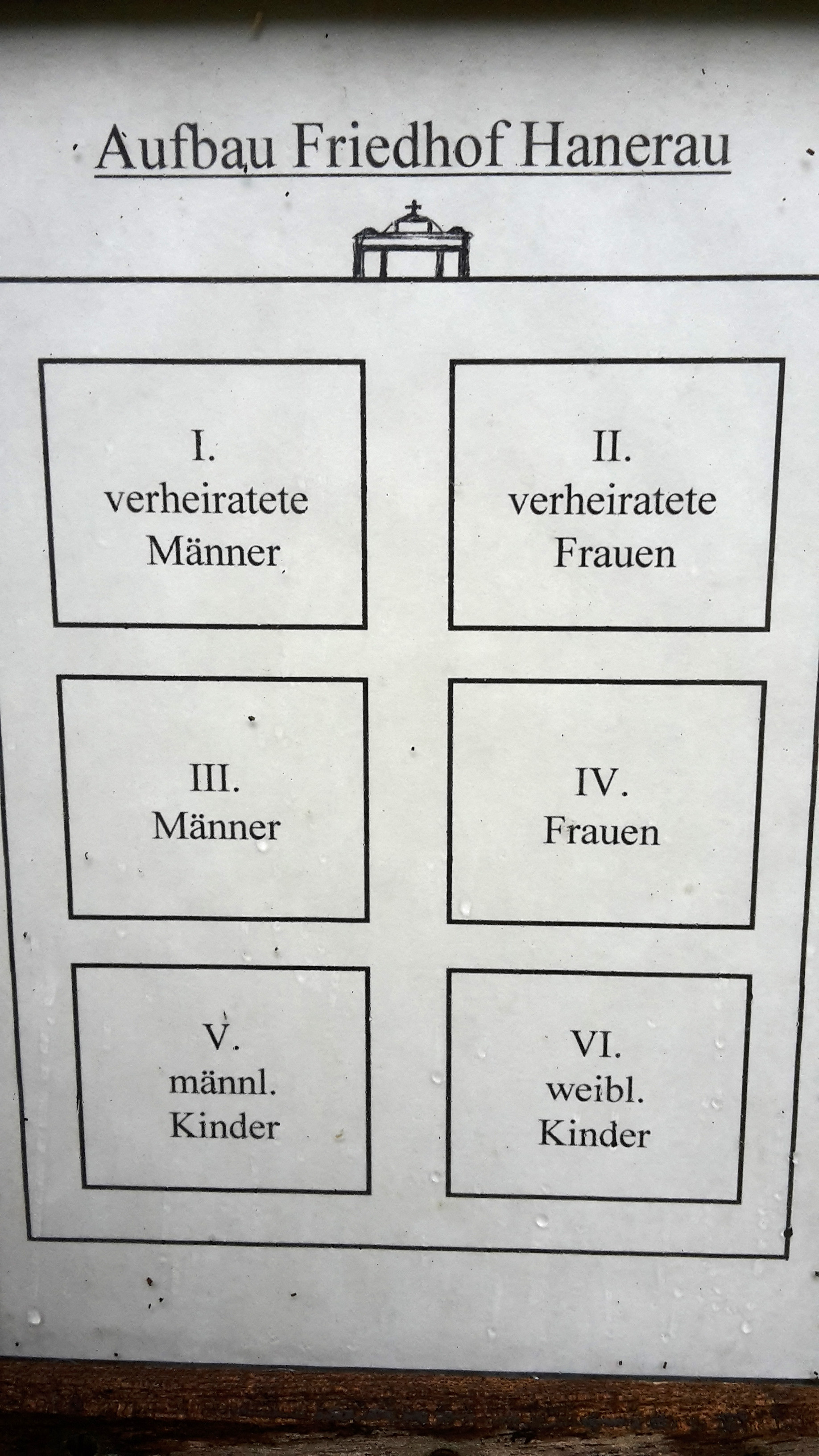 Waldpark Wilhelmshain Friedhofsstruktur